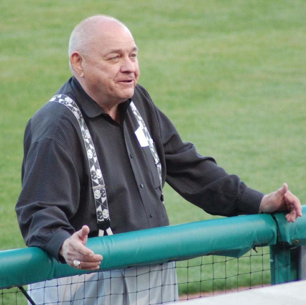 Travelers Executive Vice President Bill Valentine.